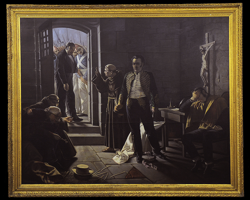 Copia del óleo del pintor uruguayo Juan Manuel Blanes, realizada por el pintor chileno José Agustín Araya en base a la copia del original que había hecho anteriormente Juan Francisco González. La escena reproduce los últimos momentos de Carrera antes de ser fusilado en Mendoza el 4 de septiembre de 1821. El sacerdote que está a sus espaldas conminando a los soldados que esperen a que Carrera termine de hablar es José Benito Lamas.